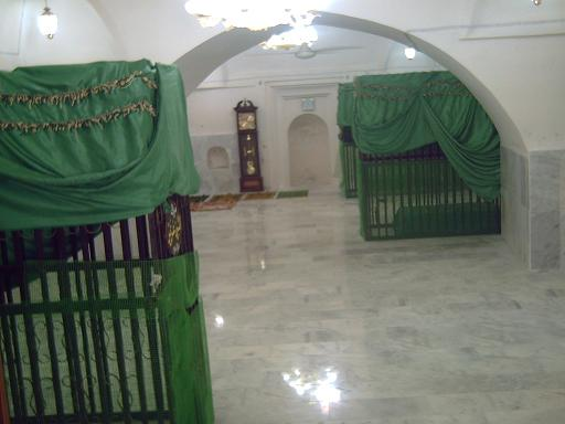 مراقد الأنياء دانيال وعزير وحنين